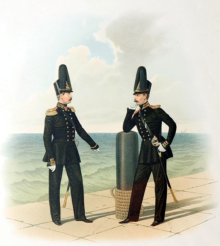 Штаб-офицер и Обер-офицер Гвардейского Экипажа (В парадном полукафтане и вице-полукафтане) 15 Марта 1855.